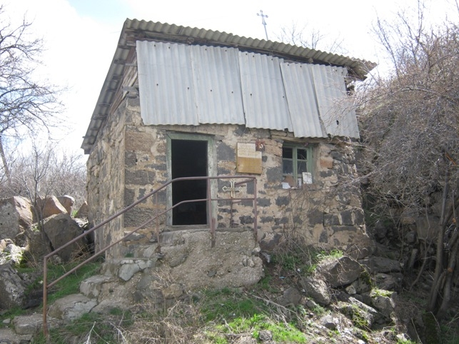 Թուխ Մանուկ մատուռ;շ